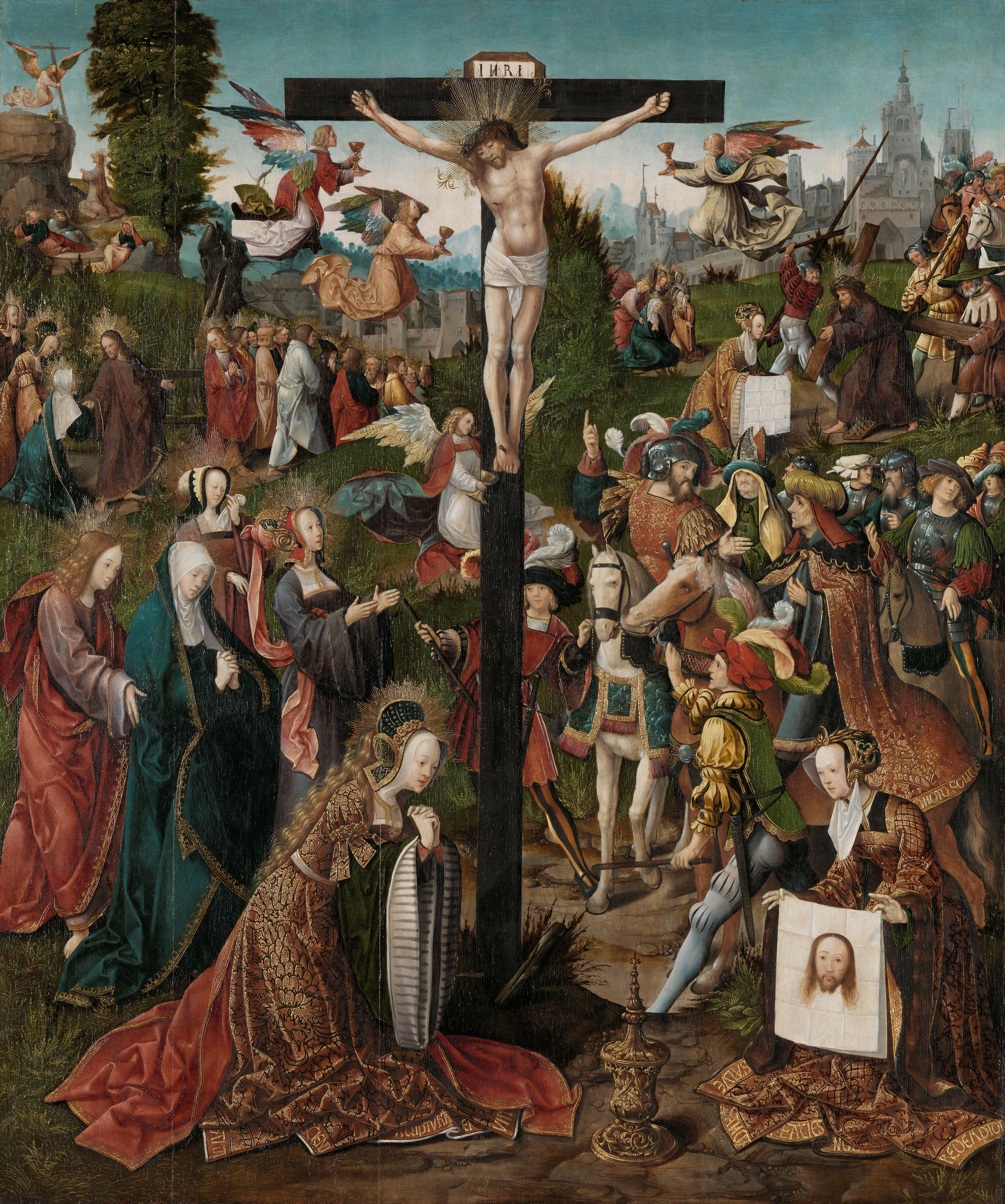 Kruisberg met vele figuren en verschillende epiodes uit de Passie. In het midden Christus aan het kruis, met vier engelen die het bloed opvangen. Op de voorgrond Maria Magdalena, Maria, Johannes en de heilige Veronica met de zweetdoek. Op de rand van haar mantel staat: Salve Sact(a) Facies Nos(tri) Redemptor(is). Rechts te paard Longinus en de centurion. Op de achtergrond: de kruisdraging, Christus die afscheid neemt van zijn moeder en het gebed in de Hof van Olijven in Getsemane.; Jacob Cornelisz van Oostsanen, alias Jacob War van Amsterdam (ca. 1472/77-in of vóór 1533), Amsterdam, ca. 1507-1510, olieverf op paneel